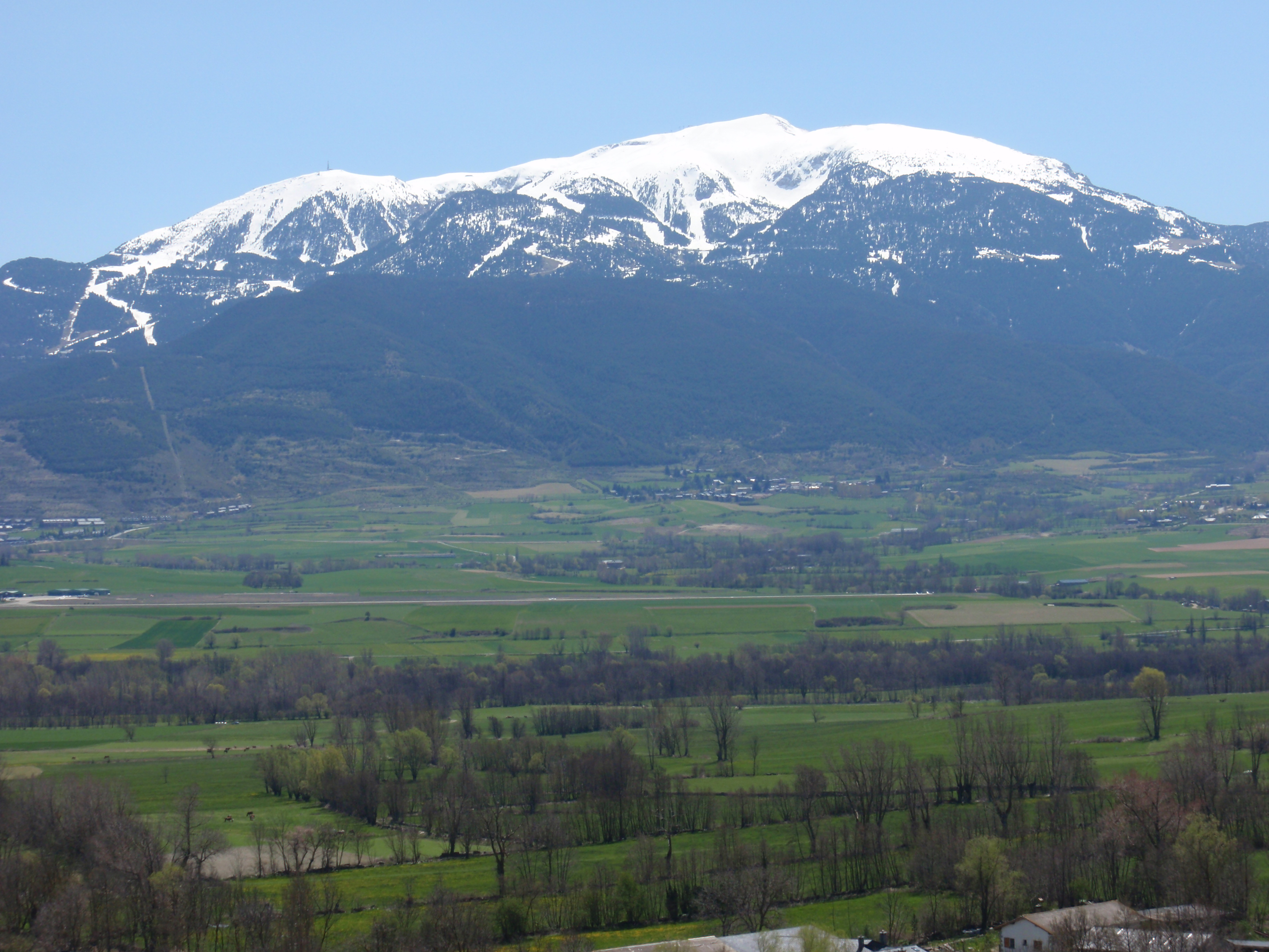 La Tosa d'Alp des de Ger This is a a photo of an emblematic summit in Catalonia, Spain, with id: CE-282081006